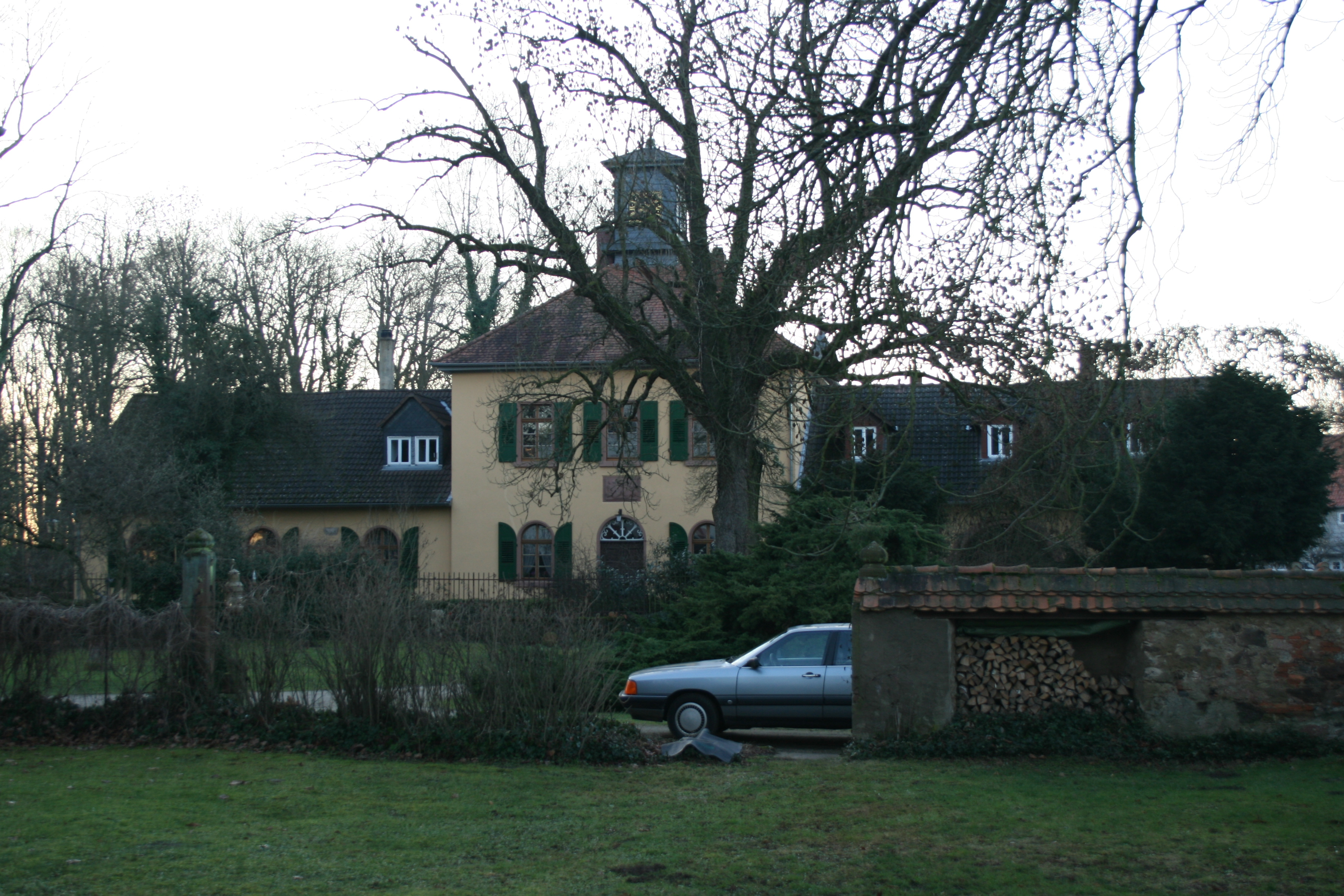 Mollersches Landhaus, Teil des ehemaligen Schlosses in Lindheim.